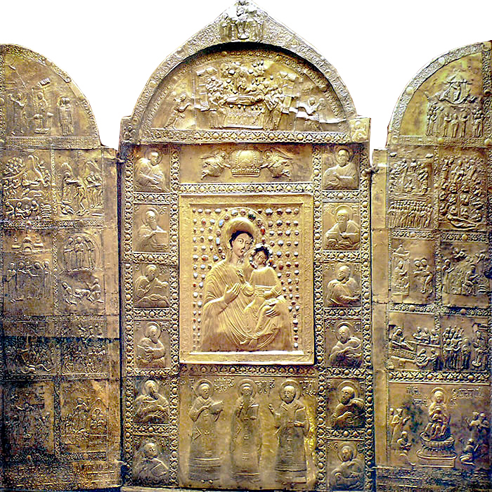 აწყურის ღვთისმშობლის ხატი